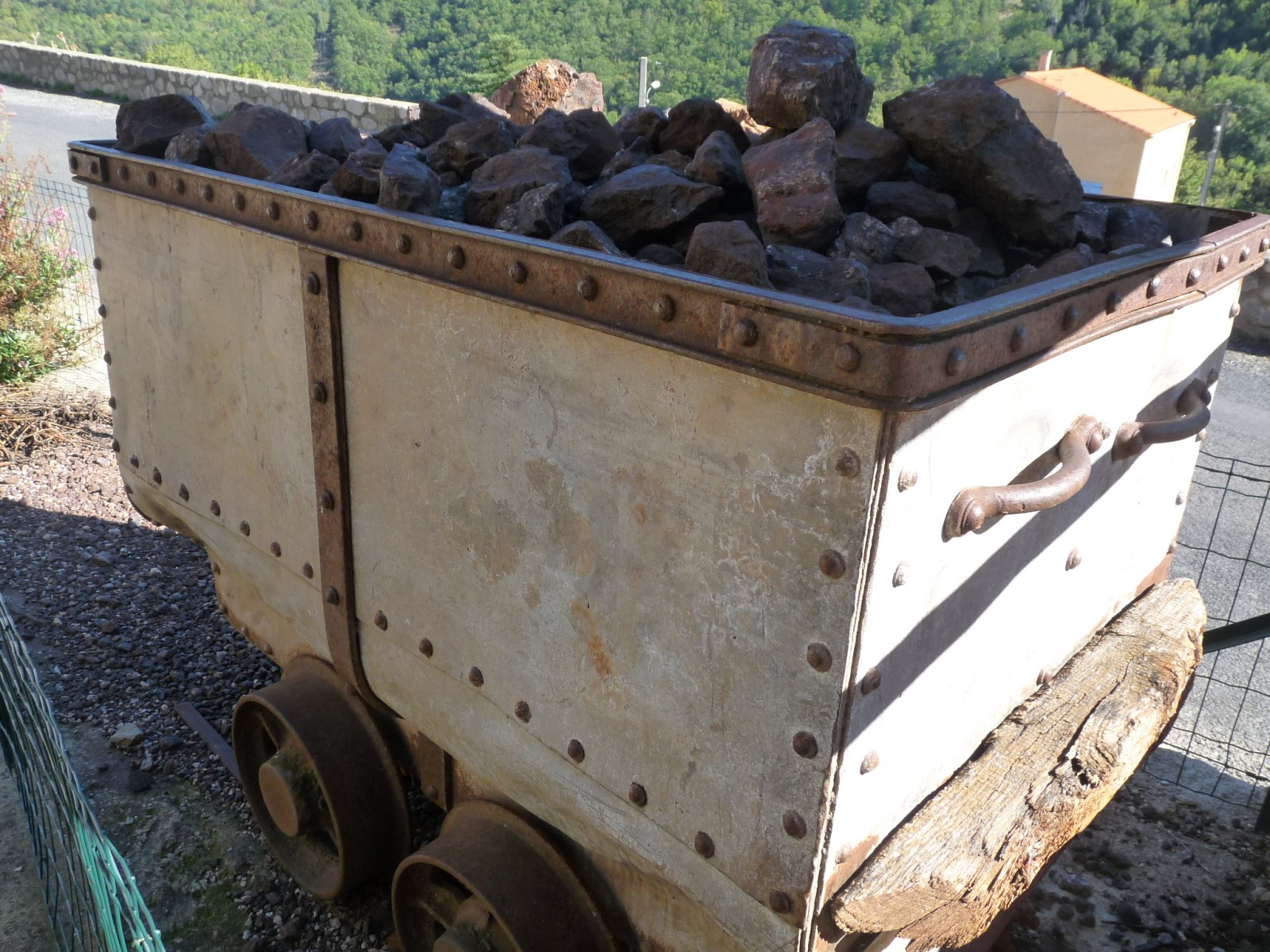 Musée des mines de fer, Escaro , Pyrénées-Orientales, France